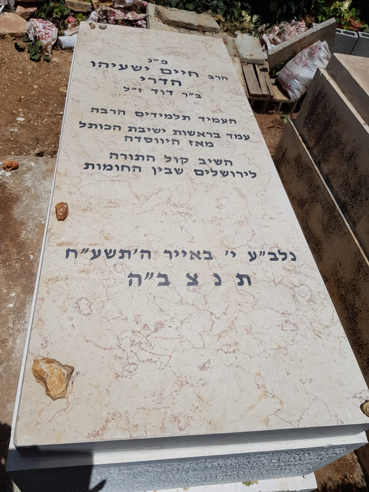 מצבתו של הרב חיים ישעיהו הדרי בבית העלמין סנהדריה בירושלים